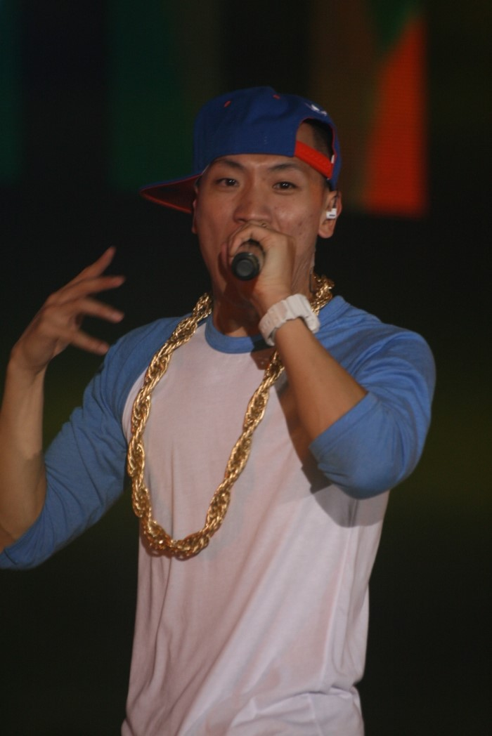 다이나믹 듀오 개코